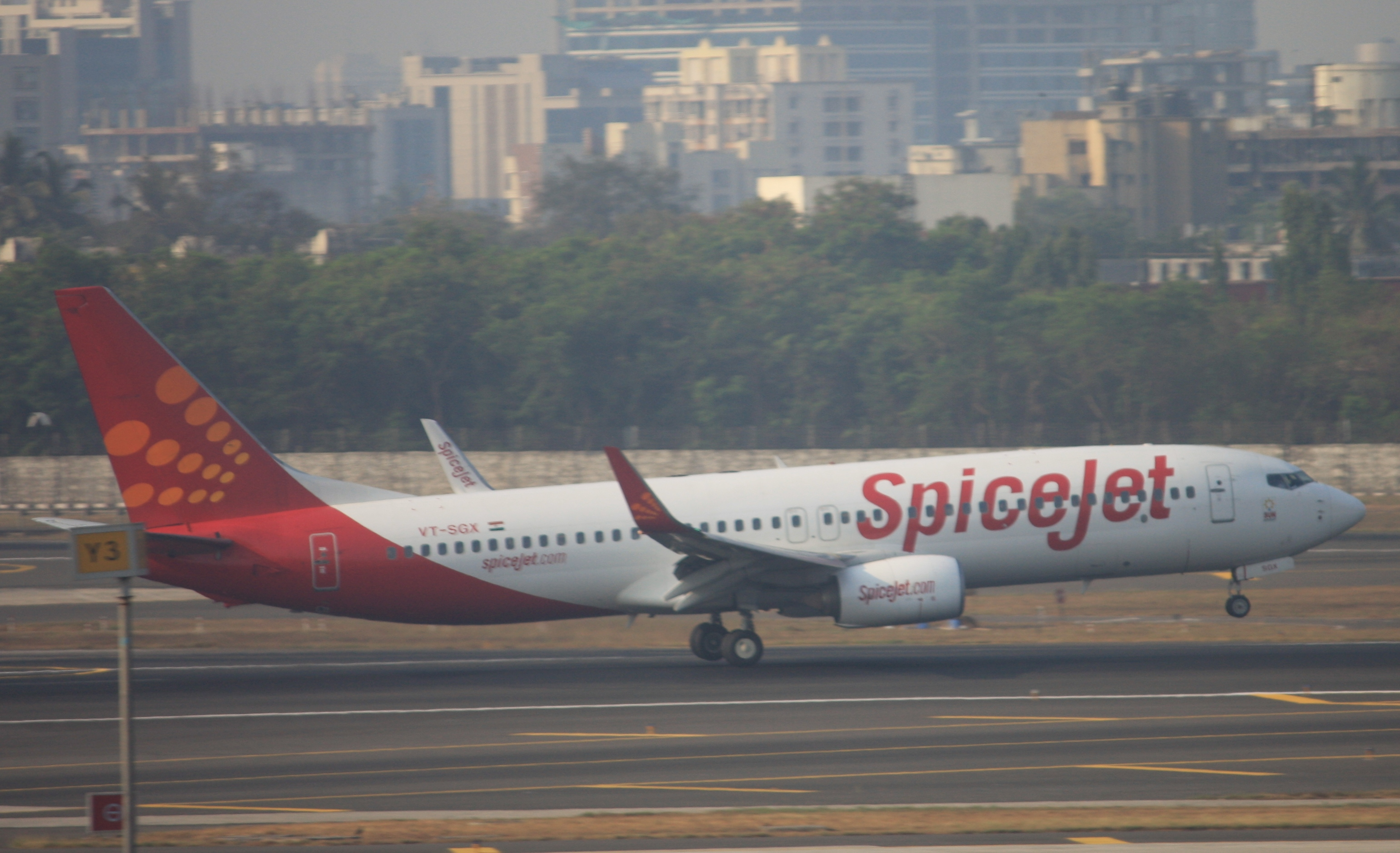 Mumbai (Bombay) - Chhatrapati Shivaji International (Sahar / Santa Cruz) (BOM / VABB) India, April 16 2014.